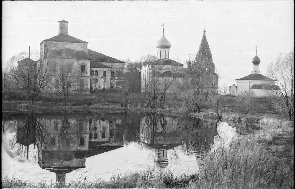 Свято-Троицкий Данилов монастырь в городе Переславле-Залесском. Вид с востока через пруд.